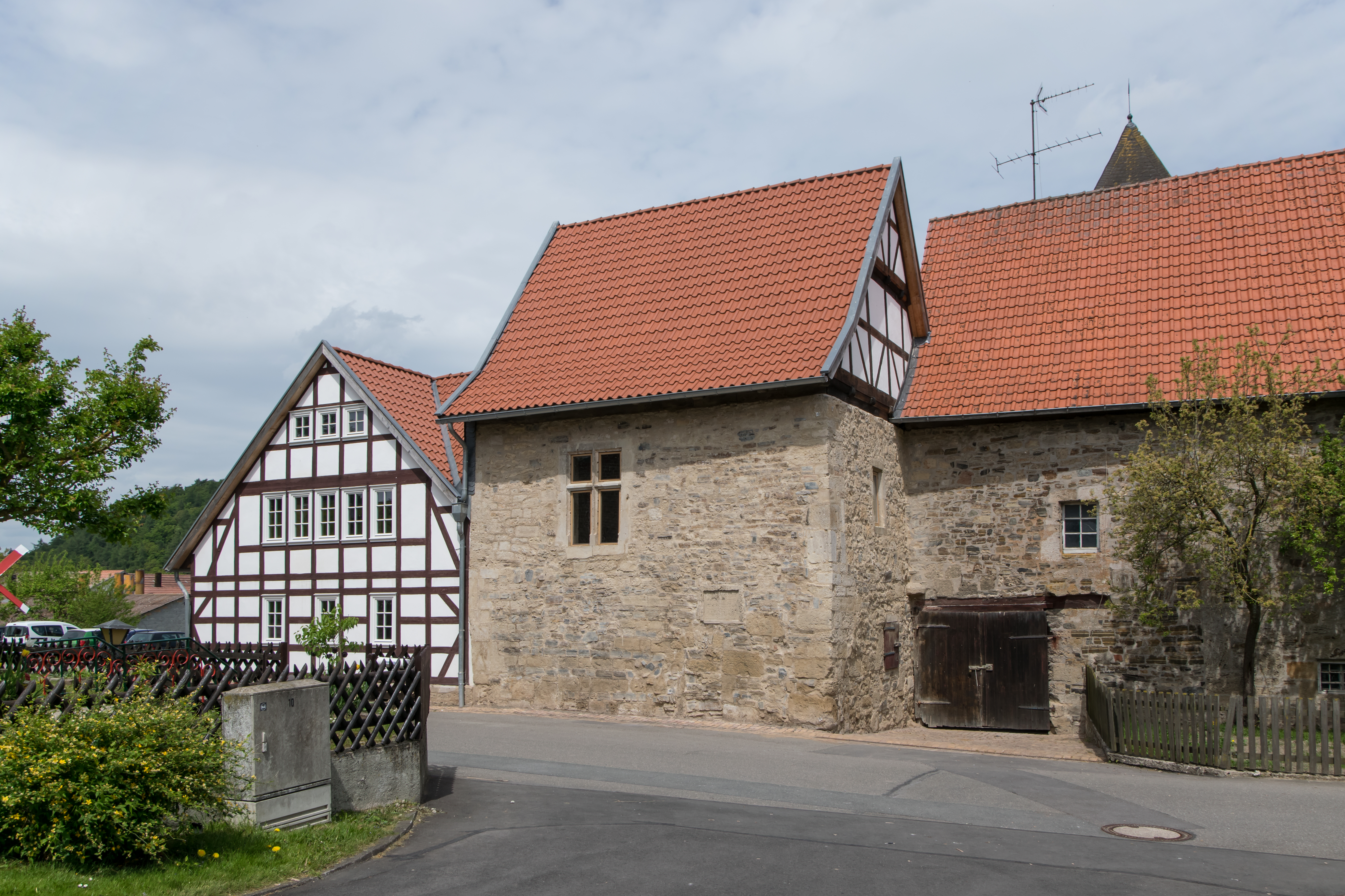 Kloster Flechtdorf Südseite.